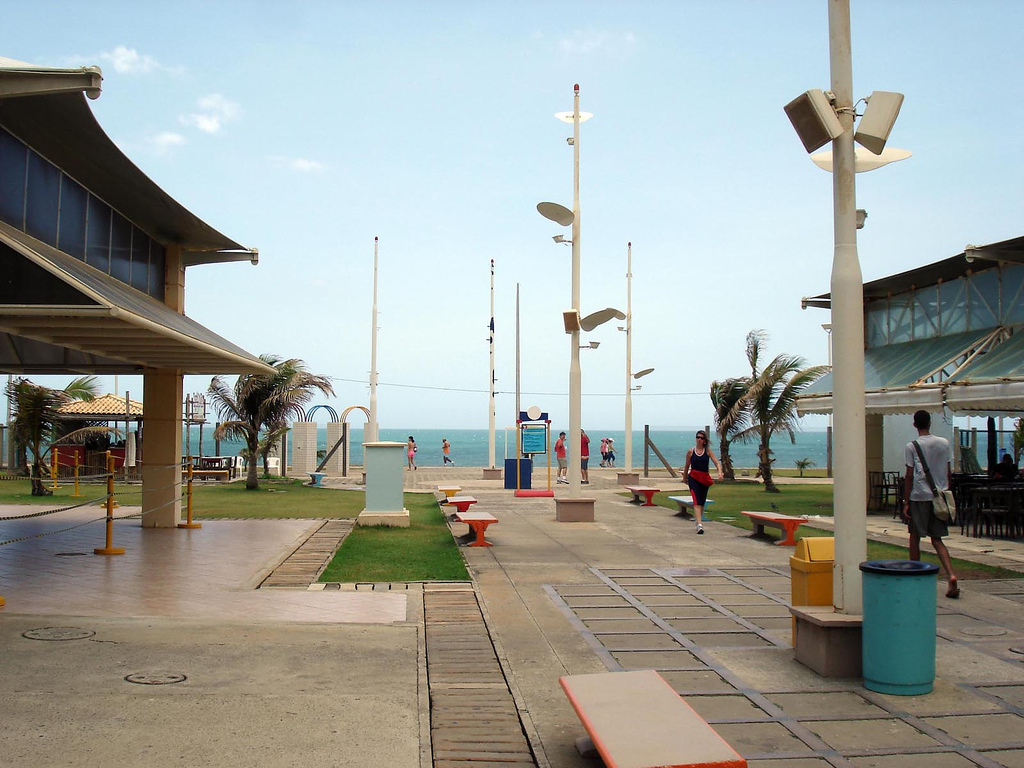 Aeroclube